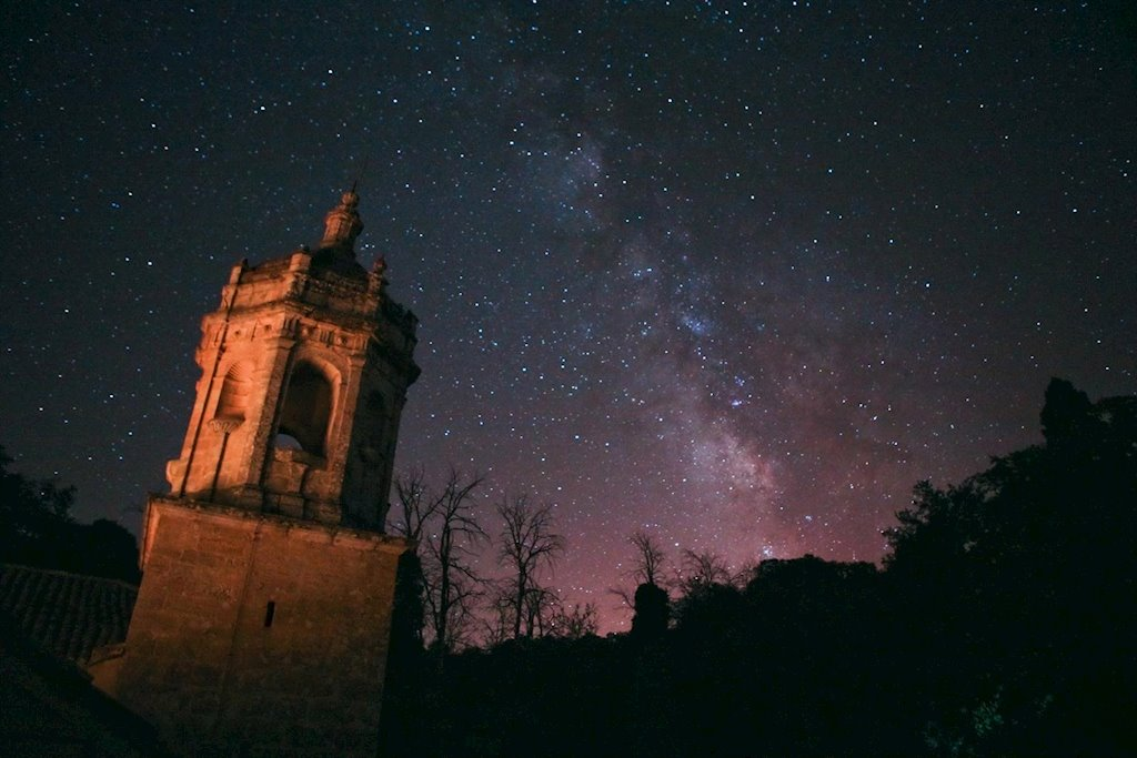 CONVENTO DE CAÑOS SANTOS BAJO LA LUNA El convento de Caños Santos se sitúa en el término municipal de Olvera, Provincia de Cádiz, (España) en un entorno de gran valor paisajístico y es propiedad del ayuntamiento de Alcalá del Valle. Remonta sus orígenes al siglo XVI cuando el Conde de Ureña y Morón facilita tierras para la construcción de una ermita a Nuestra Señora de Caños Santos. Al aumentar la devoción de la feligresía se decidió labrar el Convento y Casa en 1542, aunque en su arquitectura se mezclan con la fábrica original importantes intervenciones de los siglos XVII y XVIII. En su entorno se encuentran, asimismo, la cueva donde, según la creencia popular, se apareció la Virgen y los caños que dieron nombre al convento. En 1835, la imagen de Nuestra Señora de Caños Santos fue trasladada de forma definitiva a Cañete la Real (Málaga), de donde es Patrona, y goza de una gran devoción.